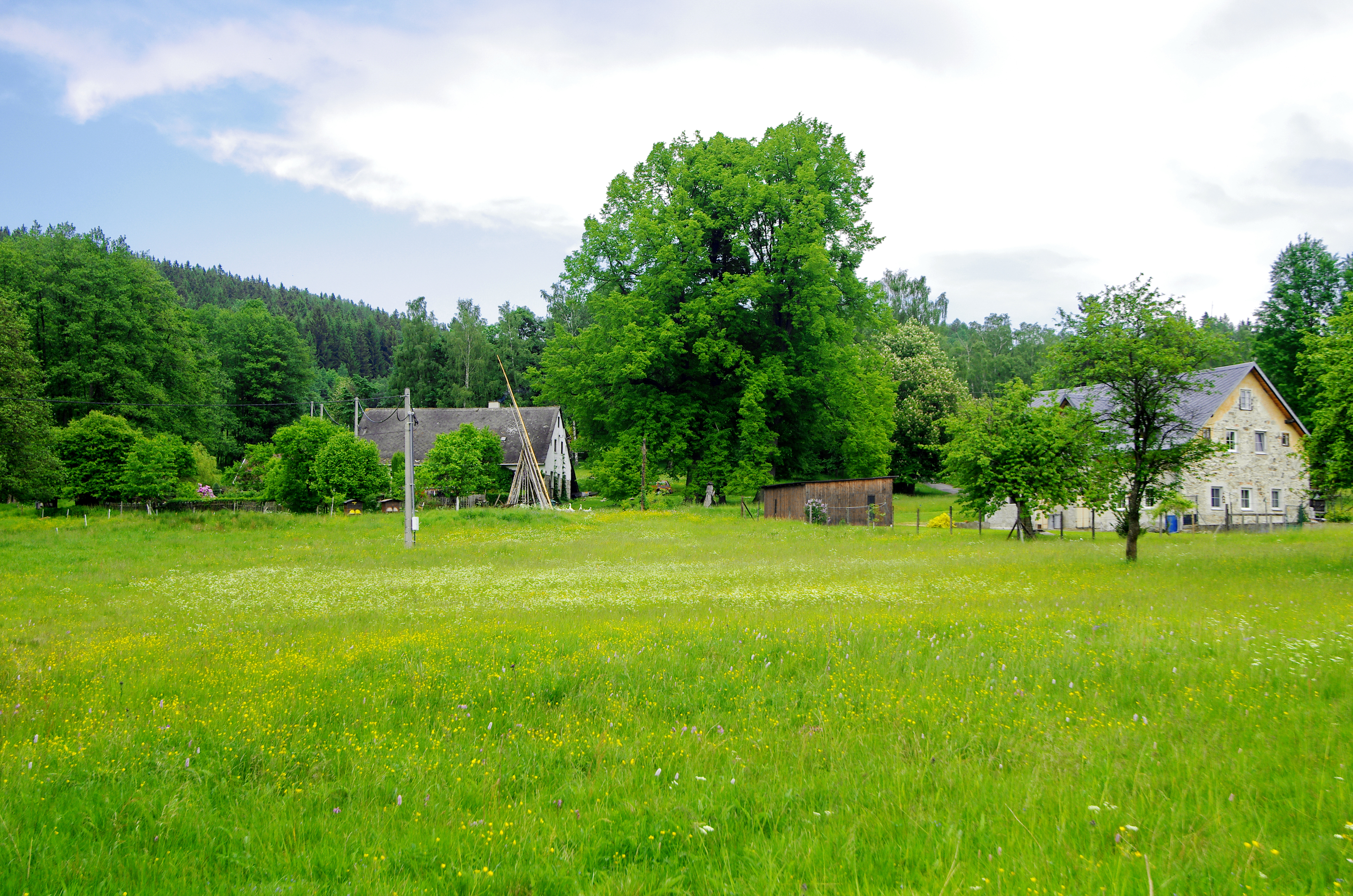 Tisová, součást města Nejdek, okres Karlovy Vary